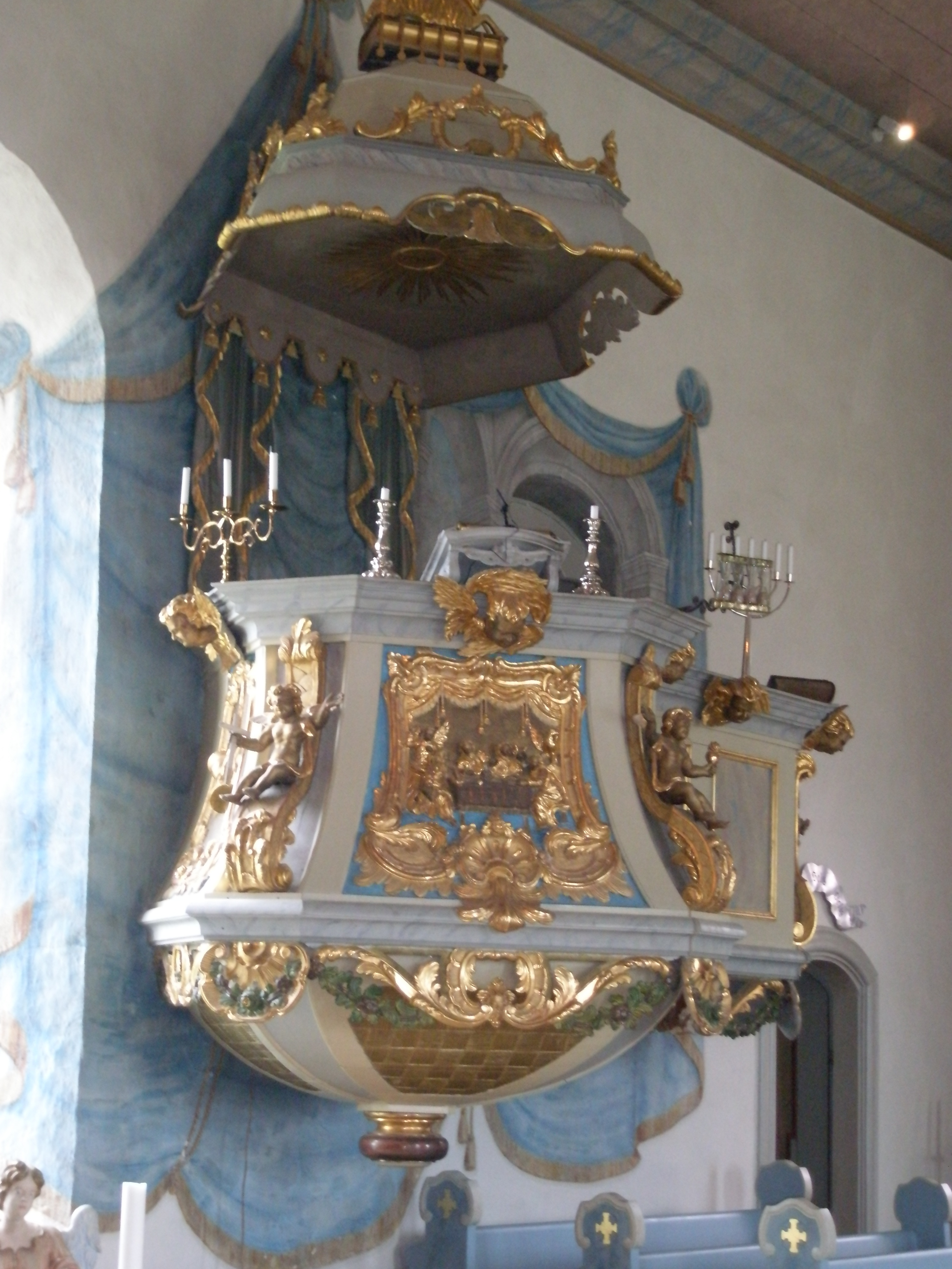 Interiör (predikstol) från Offerdals kyrka i Ede, Offerdals socken, Krokoms kommun, Jämtland, Sverige.